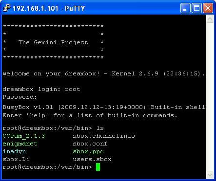 PuTTY conectat pe DM500